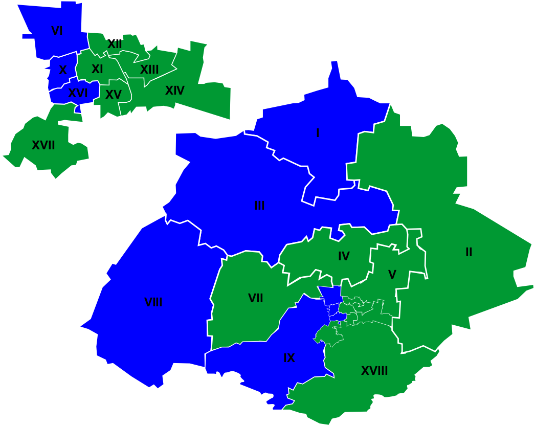 Resultados de la elección a Diputados por partido político en el estado de Aguascalientes, México en 2007.